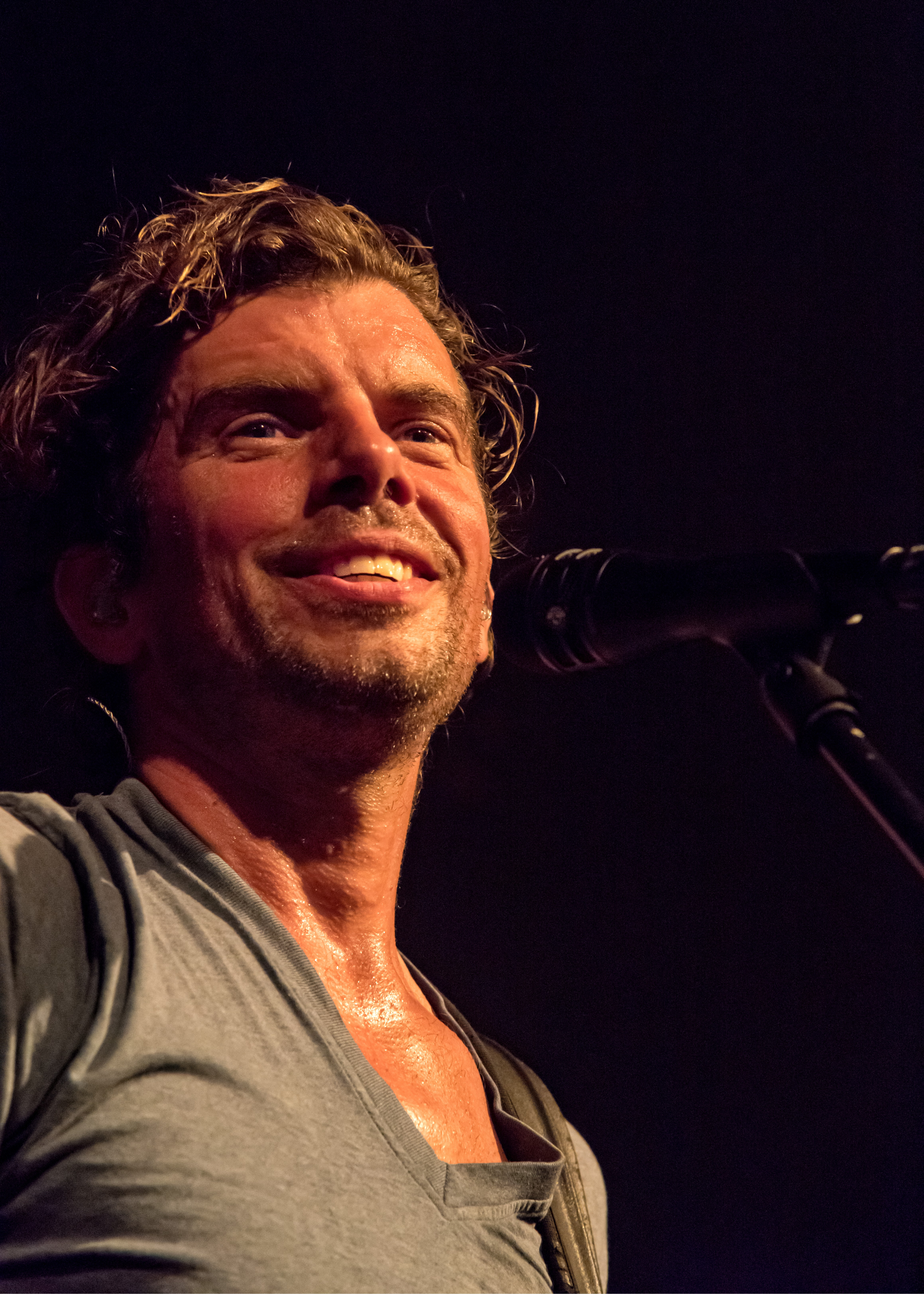 Bilder vom Zelt Musik Festival 2017 in Freiburg im Breisgau Sportfreunde Stiller am 18.07.2017